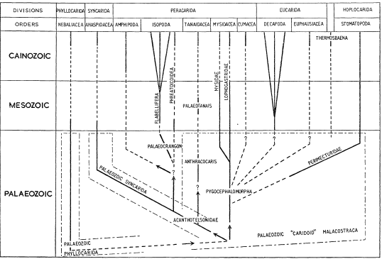 A imagem provém de um artigo (Evolutionary Trends In Crustacea - Malacostraca) e representa a evolução ao longo das eras geológicas desta classe.